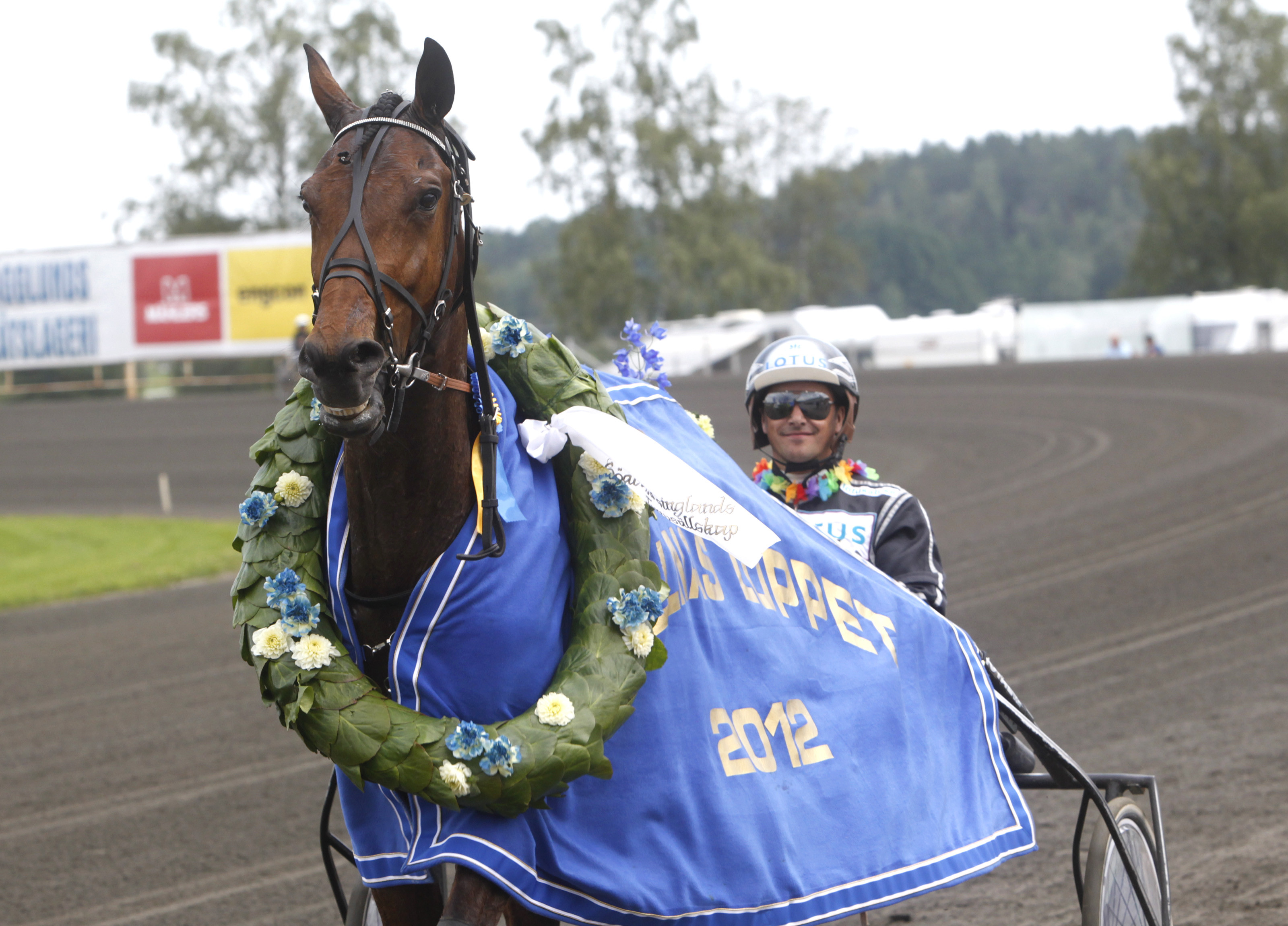 Kusken Robert Bergh och travaren Nahar vinner Bollnäsloppet 2012.